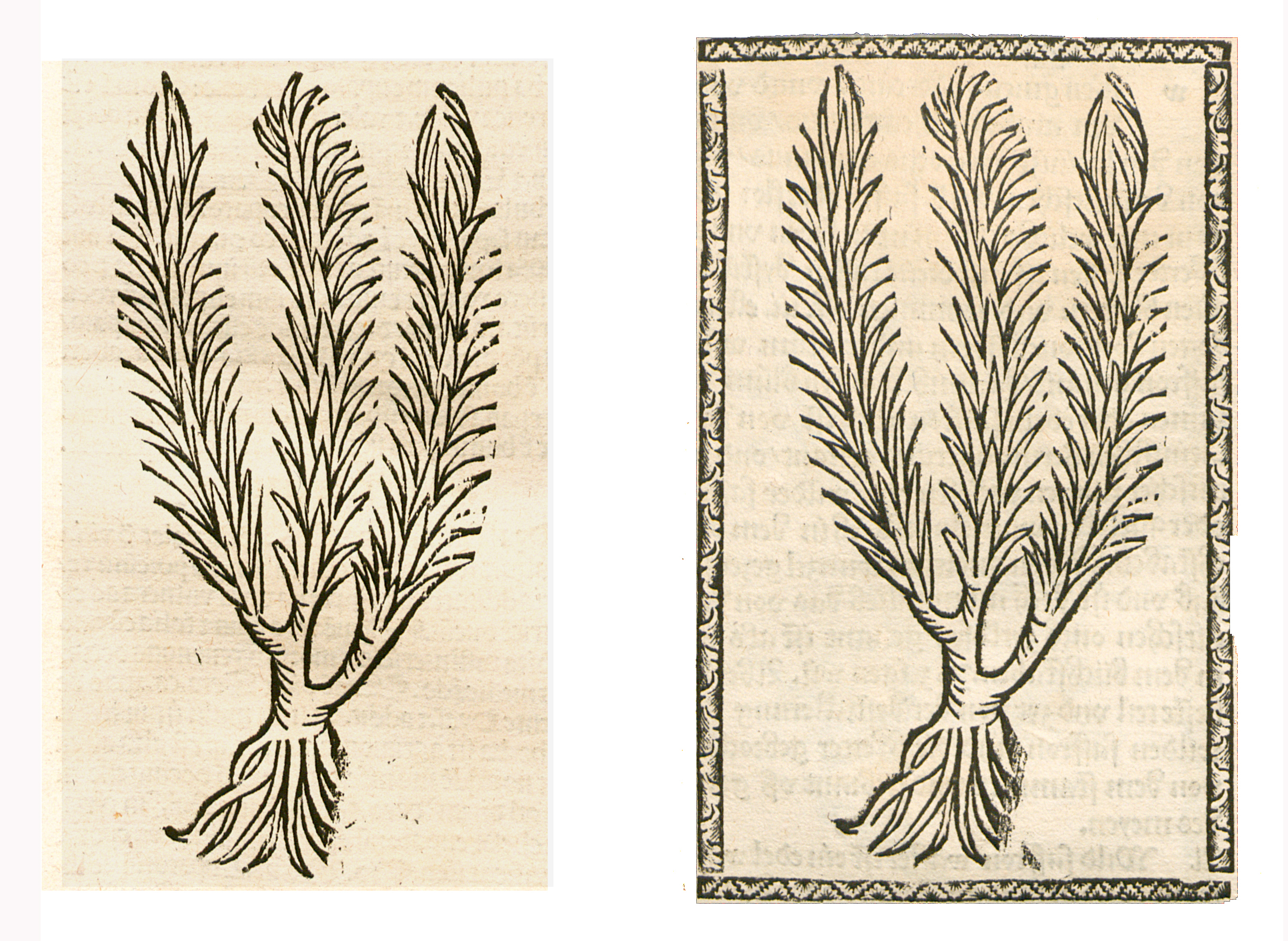 Abbildung von: XPI Wurtz (Adonis vernalis)